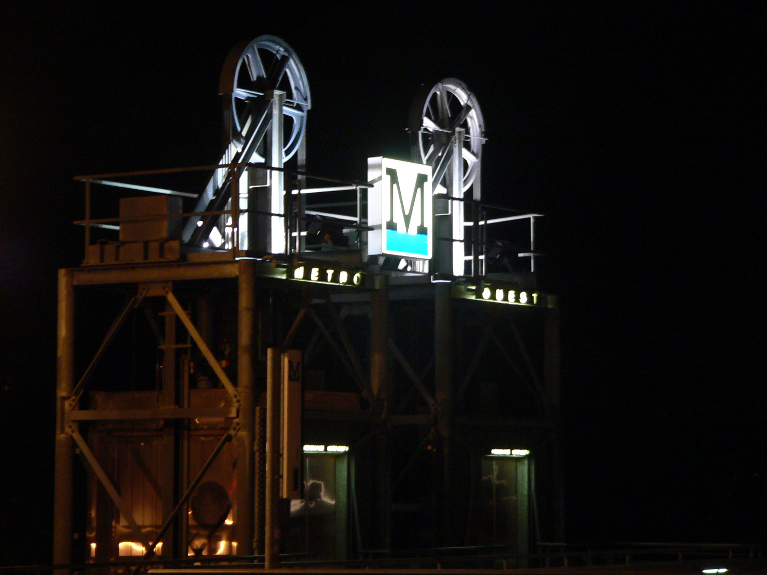 Elevators at Vigie m1 station in Lausanne.